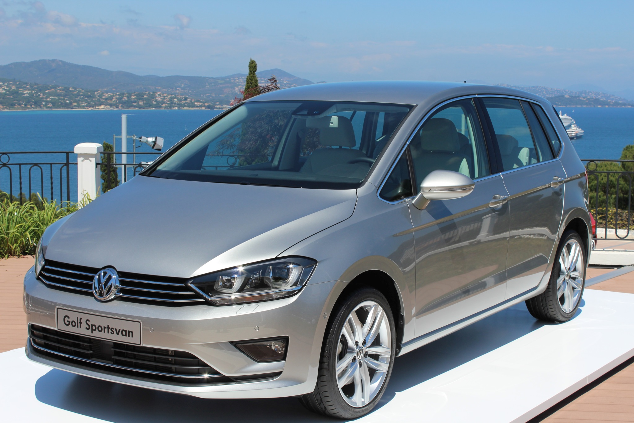 der Nachfolger des Golf Plus Basisplattform: Golf 7 Jahr: 2014